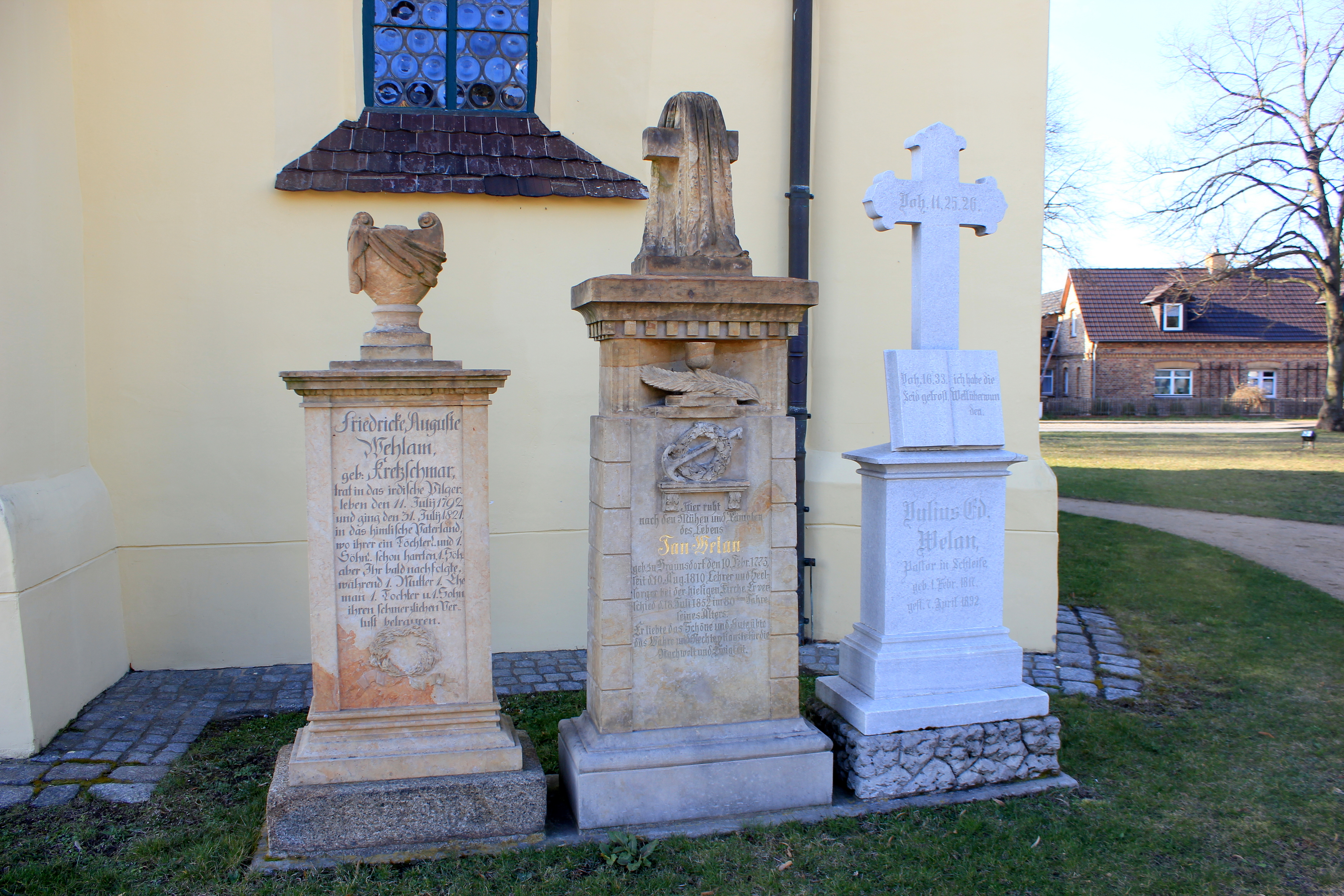 Grabsteine der Familie Wehlan an der Kirche in Schleife/Slepo. Hornjoserbsce: Narowne kamjenje Wjelanec swójby při Slepjanskej cyrkwi.